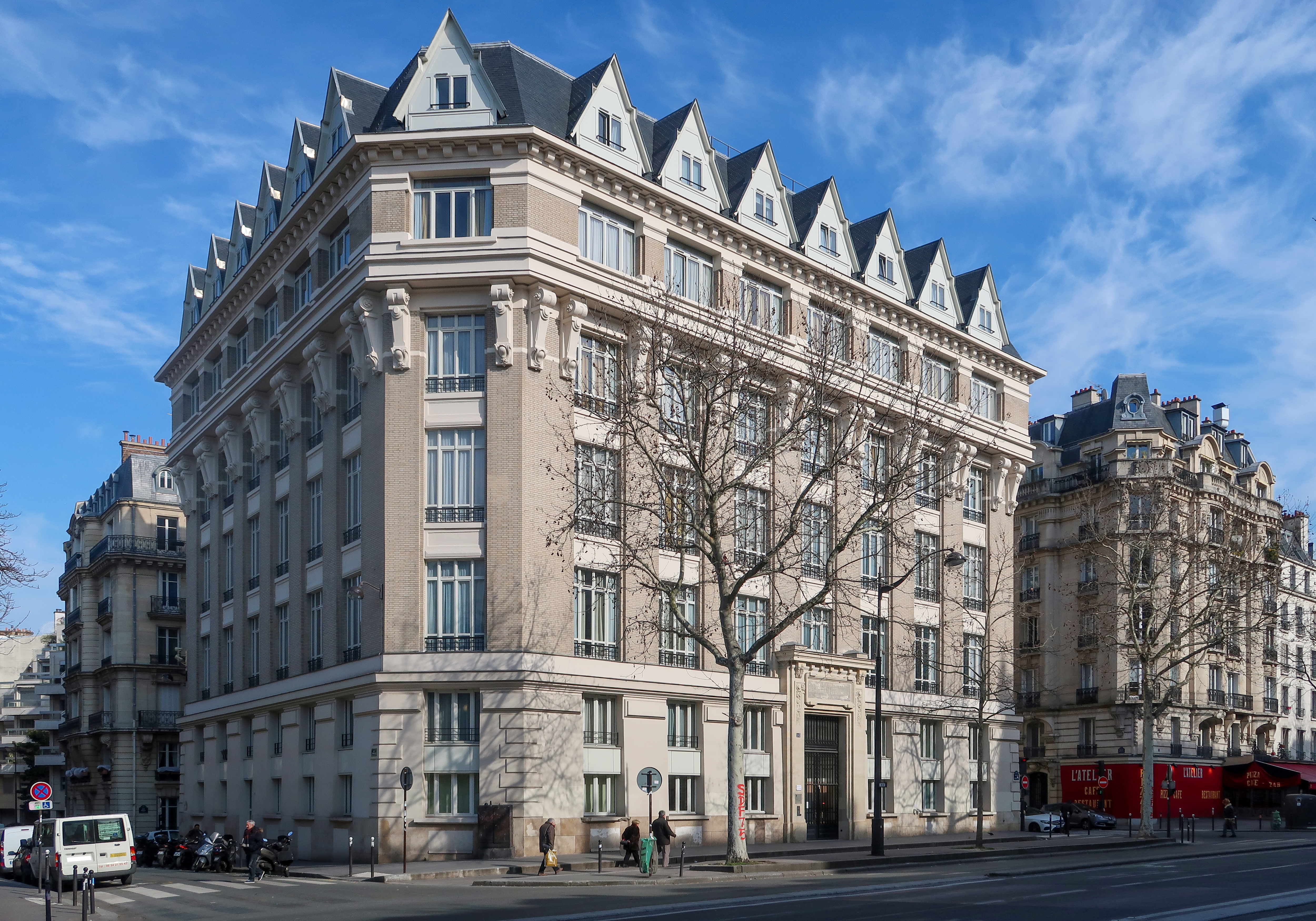 93 boulevard du Montparnasse (Paris, 6e).